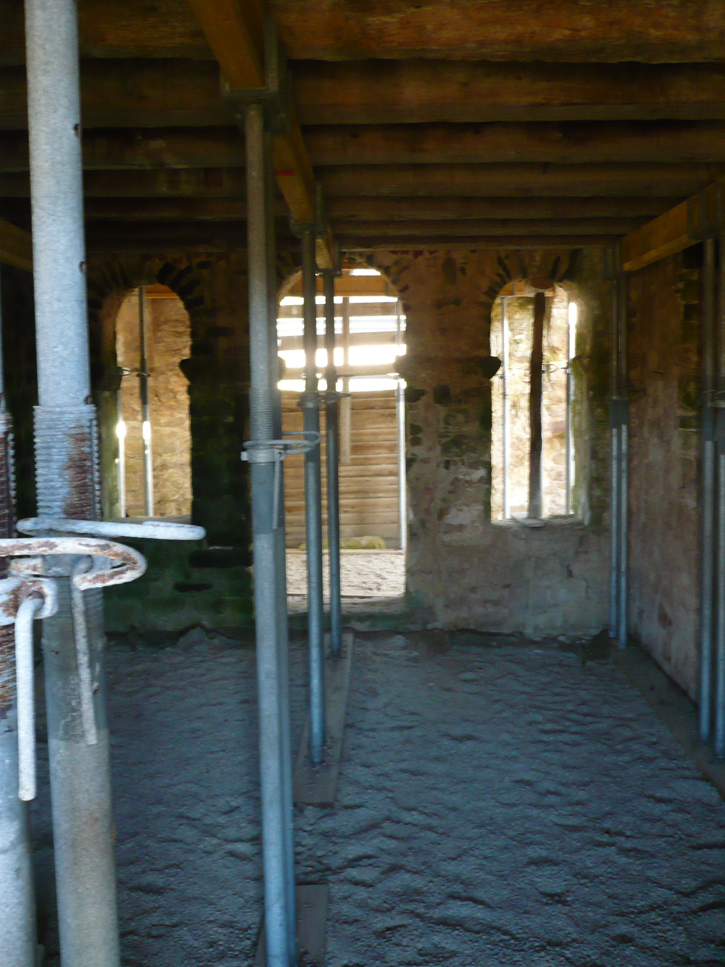 Igreja de São Gião da Nazaré - obras de restauro